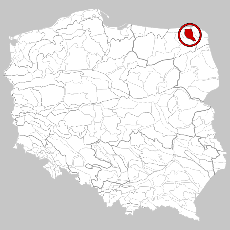 Physico-geographical regionalization of Poland Mezoregion 842.72 Western Suwałki Lakeland Regionalizacja fizycznogeograficzna Polski Mezoregion 842.72 Pojezierze Zachodniosuwalskie